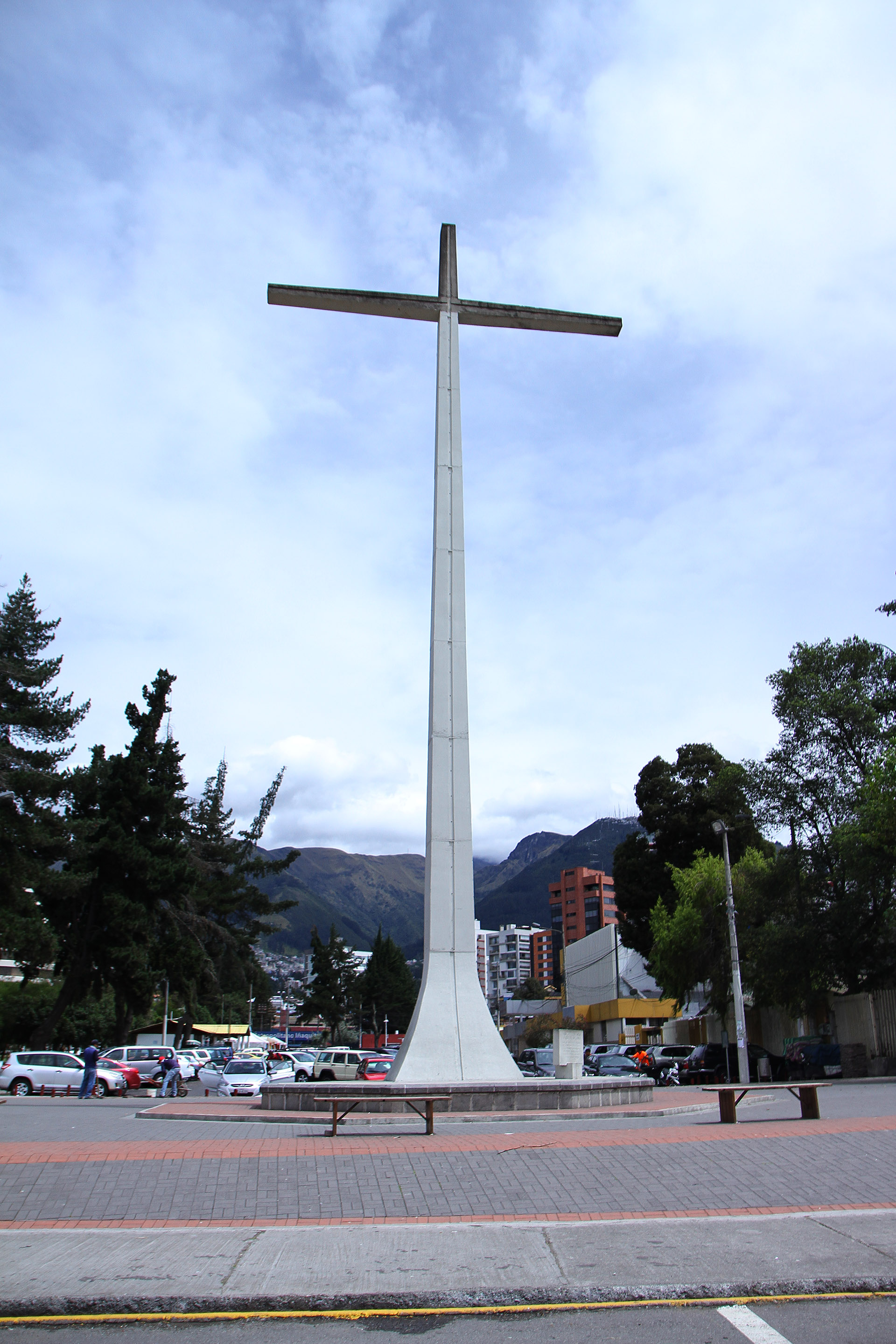 Quito, 8 jun (Andes).- Medardo Ángel Silva, secretario de la Cooperación Fraterna de Múnich y Freising con la Iglesia de Ecuador ofrece entrevista a Andes. Adicional fotografías de la cruz del Papa, en el parque La Carolina, símbolo de su visita al país en el año 1985. Fotografías: Carlos Rodríguez/Andes